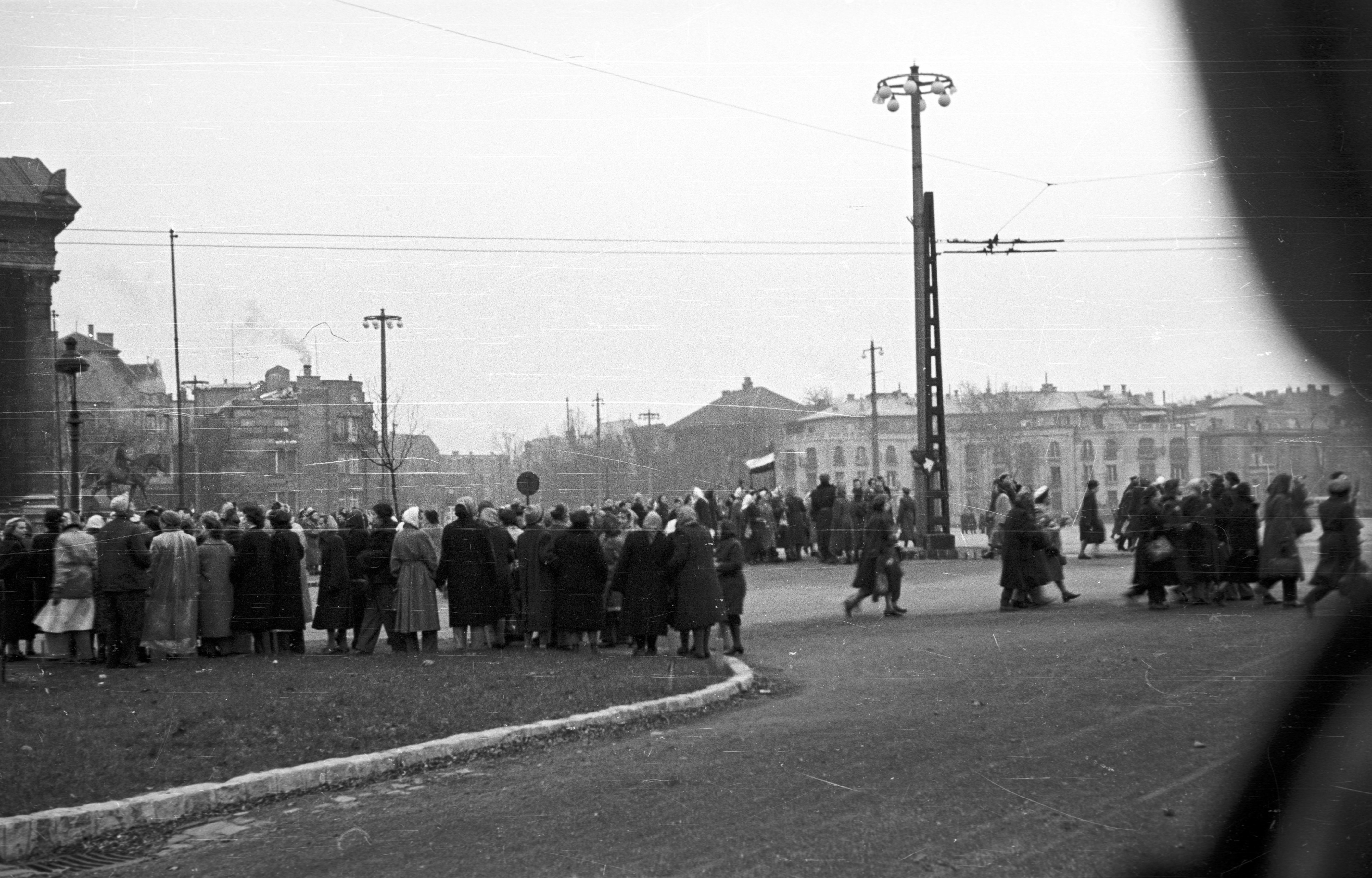 Hősök tere a Műjégpálya felől nézve. 1956. december 4-i Nőtüntetés. Location: Hungary, Budapest XIV. Tags: Budapest, revolution Title: Hősök tere a Műjégpálya felől nézve. 1956. december 4-i Nőtüntetés.